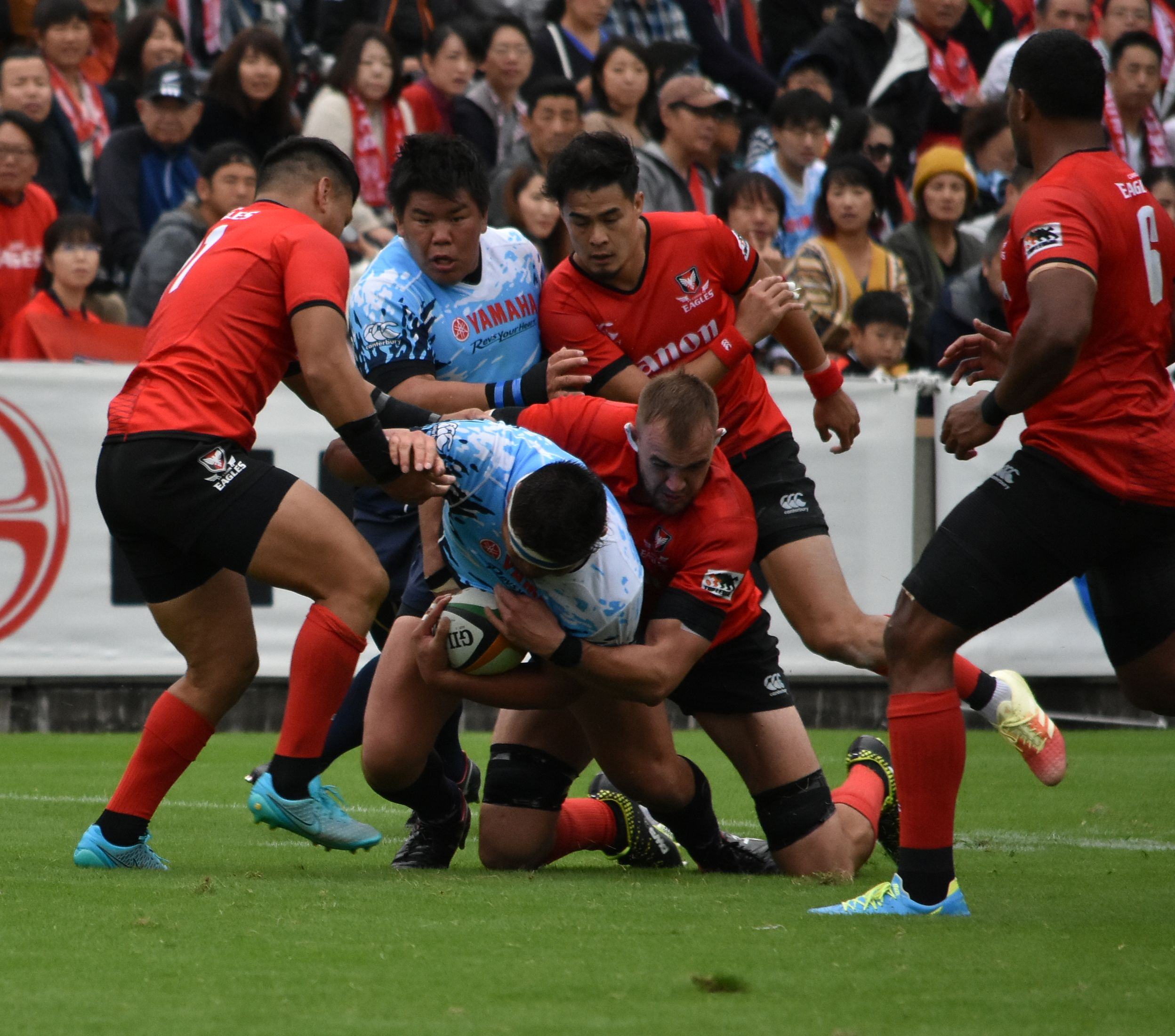 山本 幸輝